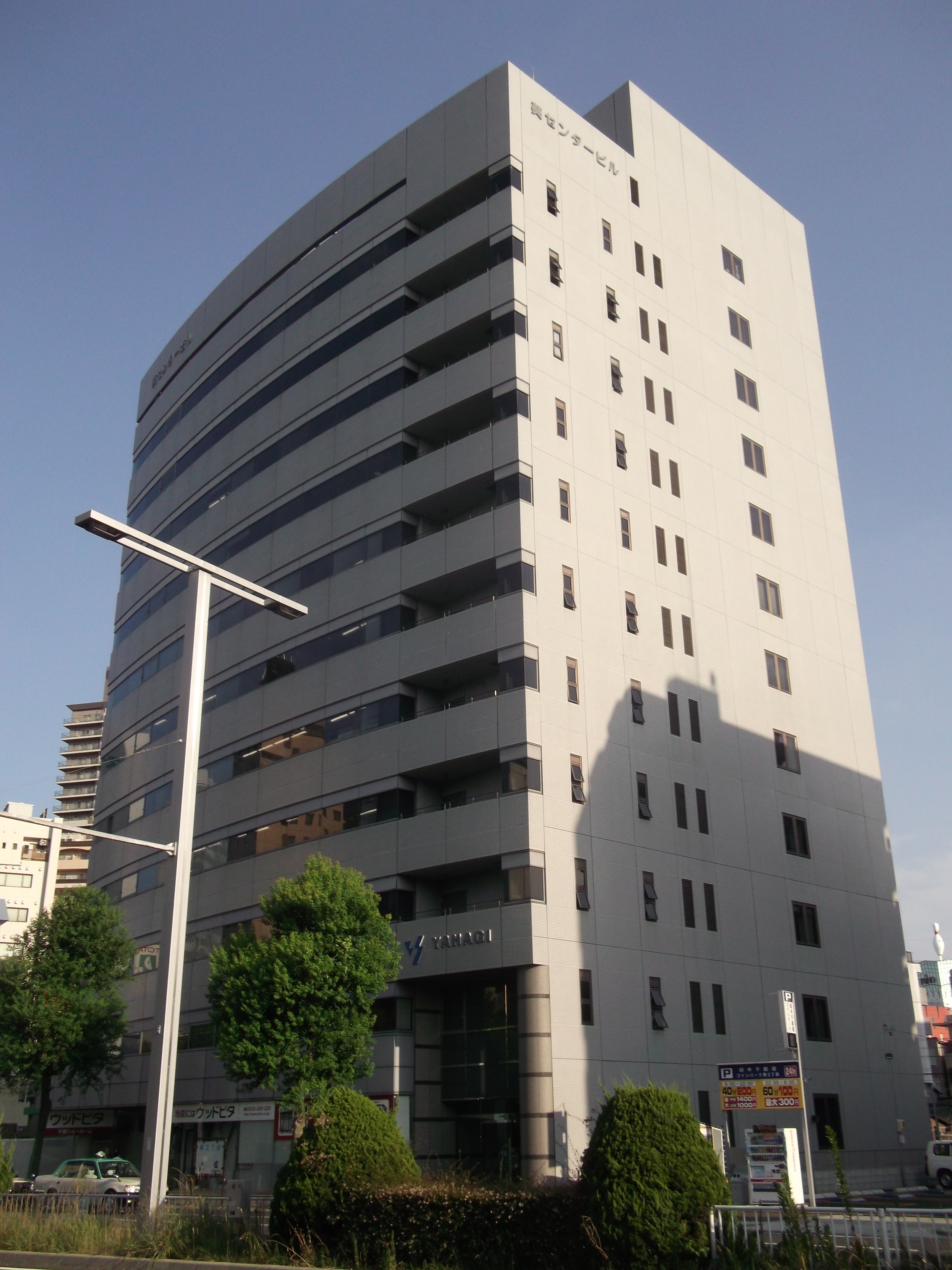 名古屋市東区葵の矢作建設本社を北側公道西側より撮影